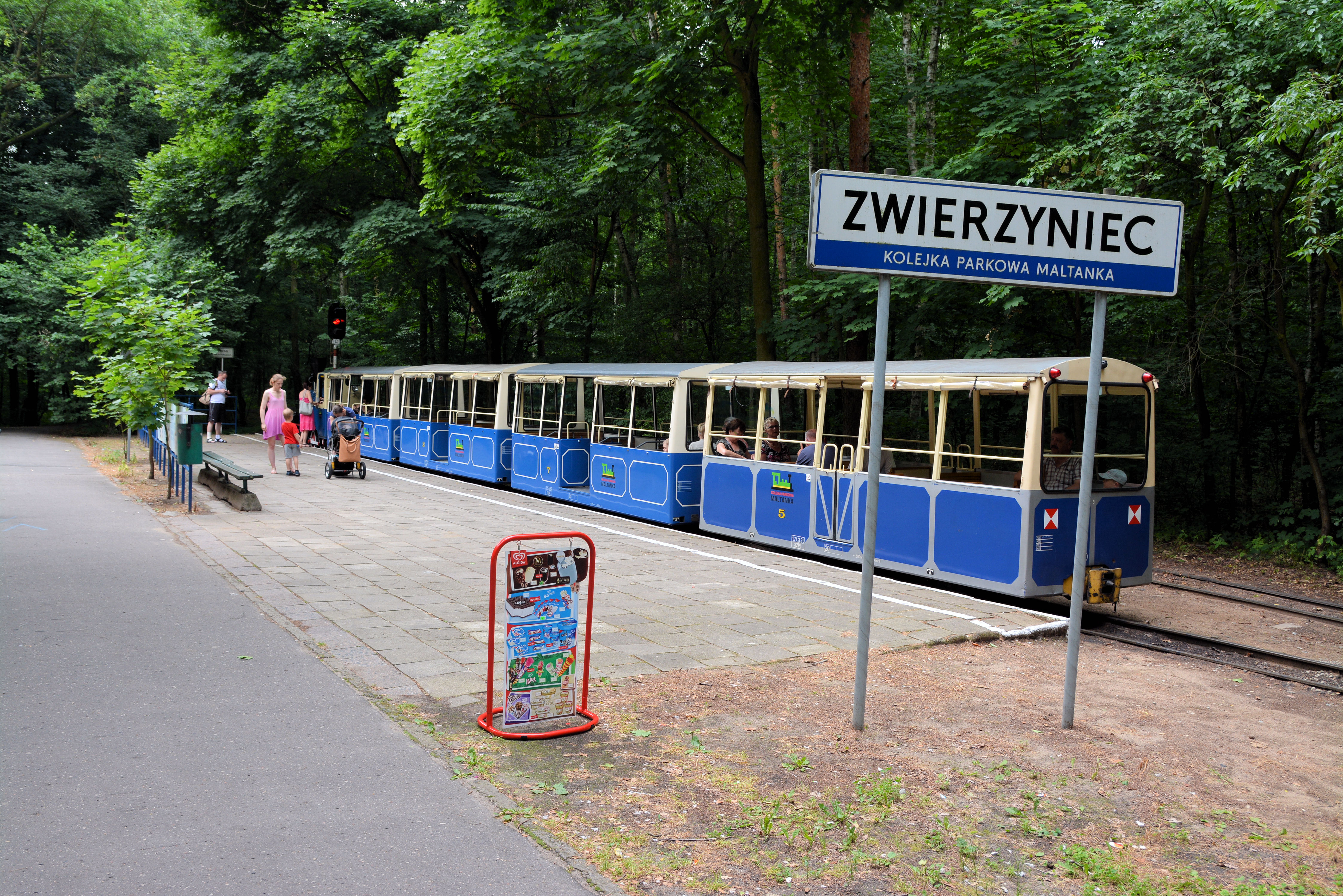 Stacja Zwierzyniec Kolejki Parkowej "Maltanka" w Poznaniu